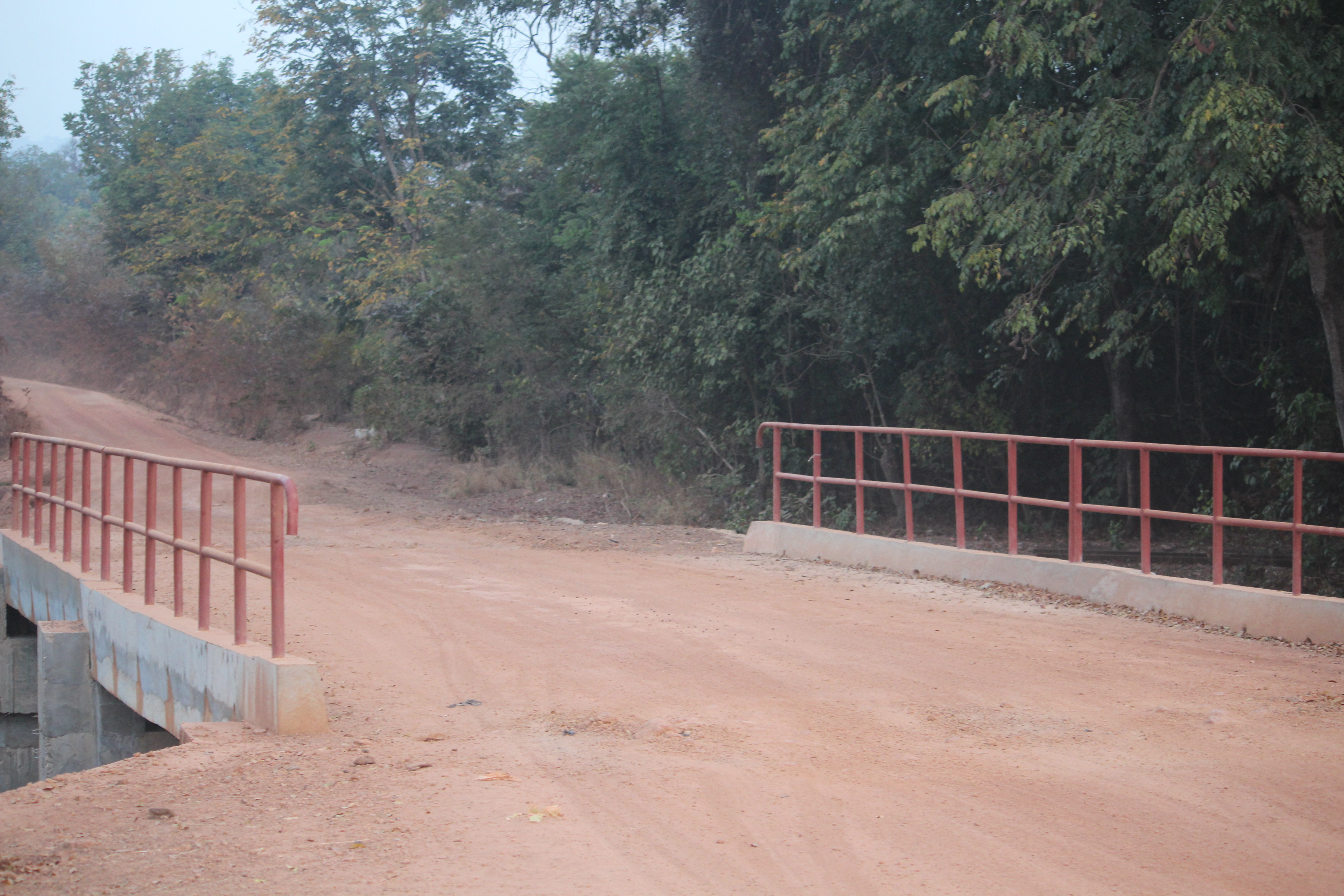 Pont de Nbagou Mali (Ville) This is an image with the theme "Africa on the Move or Transport" from: Guinea